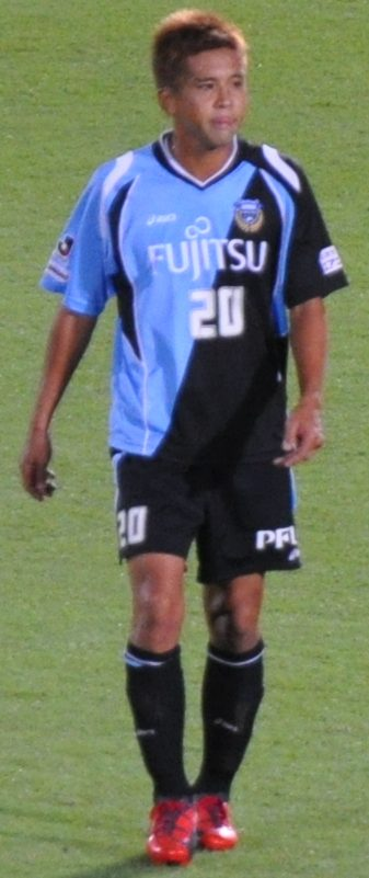 Kawasaki Frontale vs Gamba Osaka_229